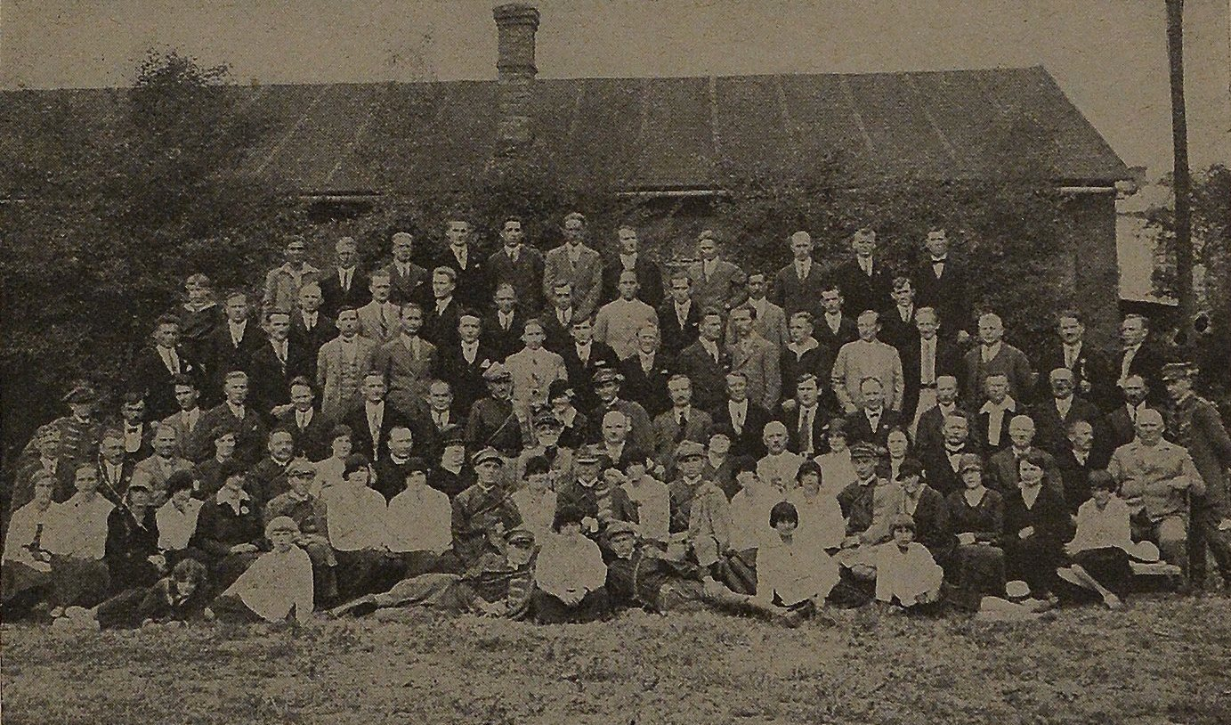 Polskie Towarzystwo Gimnastyczne Sokół Dziedzice 1930.